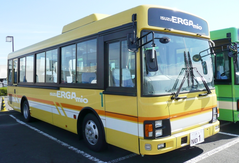 全国白バイ安全運転競技大会にて撮影。